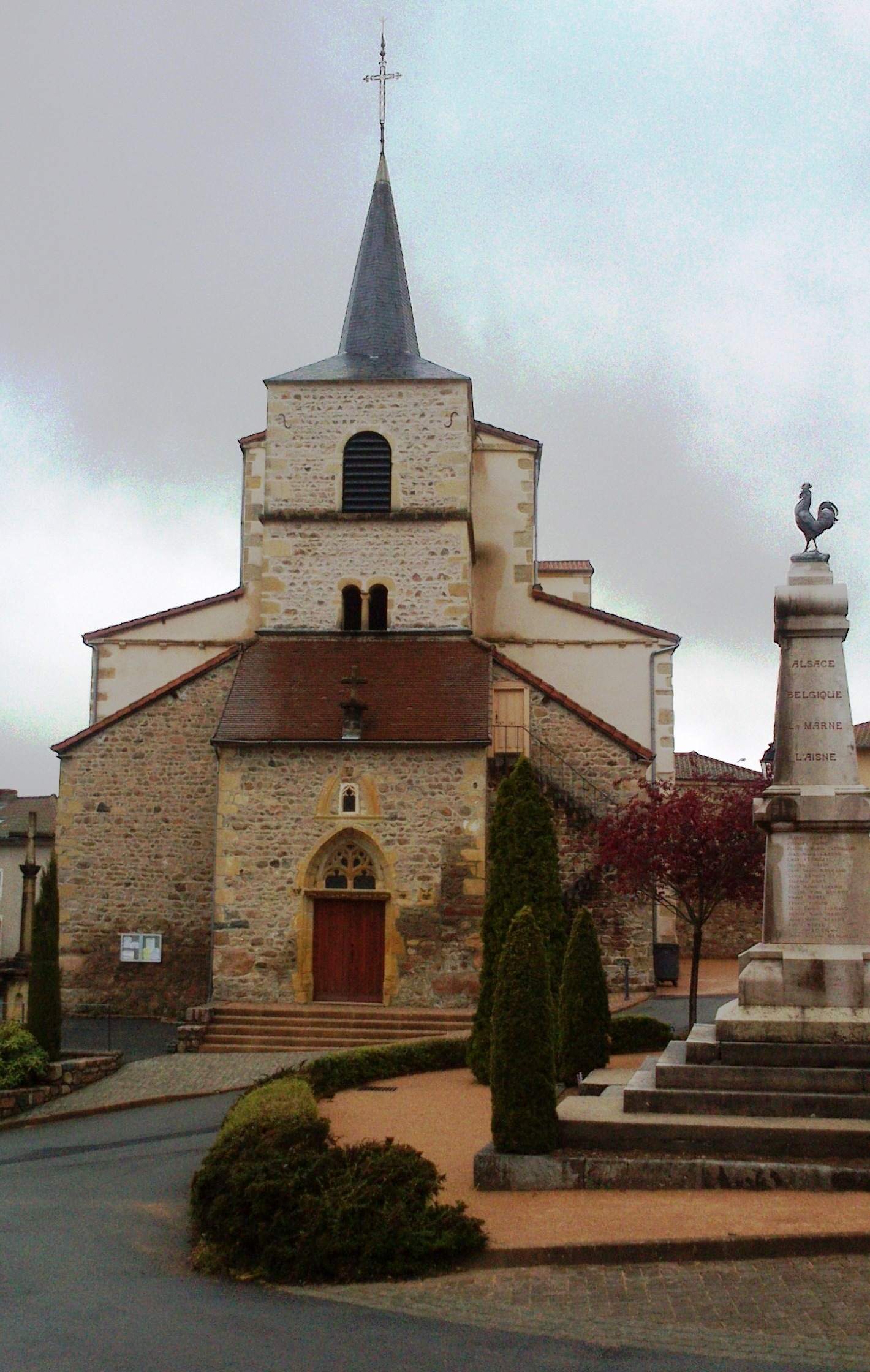 Vue de l'église Saint-Jean-Baptiste et du monument aux morts, sur la place centrale du village.